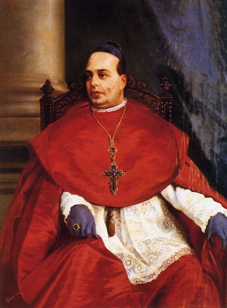 Don Jacinto Mª Cervera, III obispo de Tenerife, óleo sobre lienzo, 119 x 88 cm, Obispado de La Laguna, Tenerife